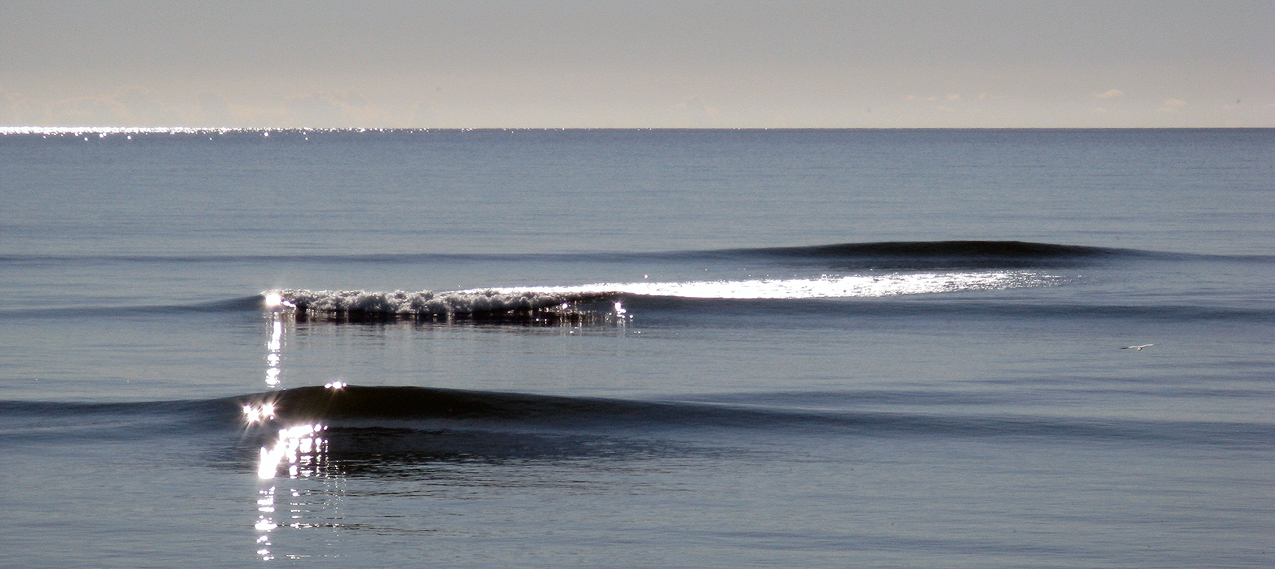 Svallvågor efter Katamaranen Leonora Christina vid Världens ände Ystad.